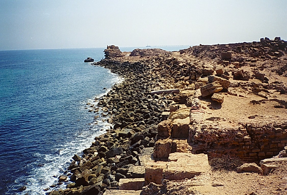 Côte Nord de Leptis Magna protégée par des enrochements en vrac et phare du port (au fond)